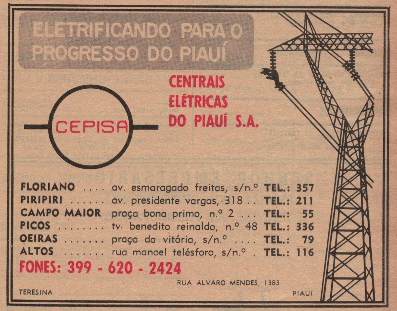 Mídia da antiga Centrais Elétricas do Piauí. S A (atual Companhia Energética do Piauí), em 1972, com endereços dos principais escritórios.